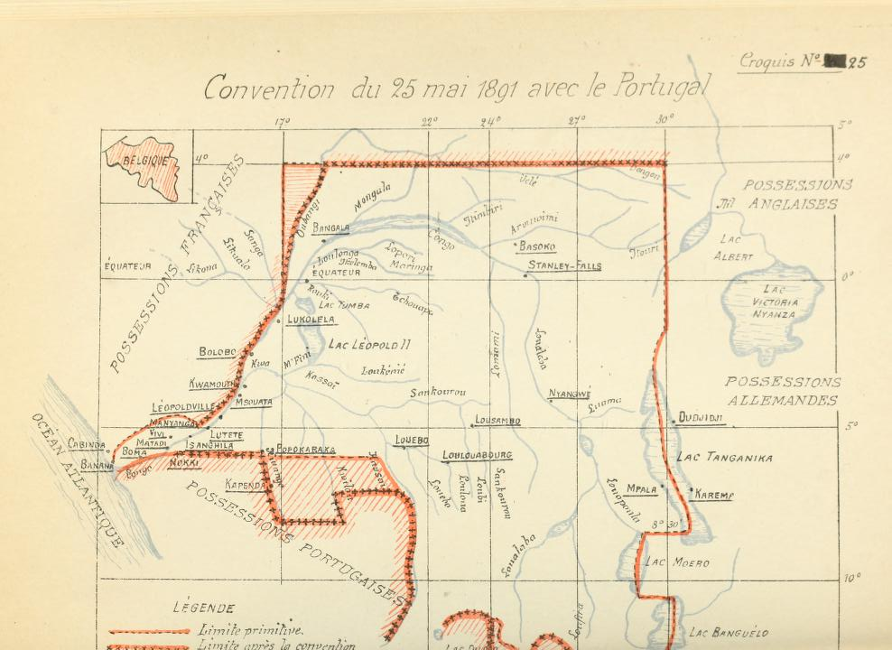 Frontière entre l'Etat Indépendant du Congo et l'Angola portugais au XIX s.